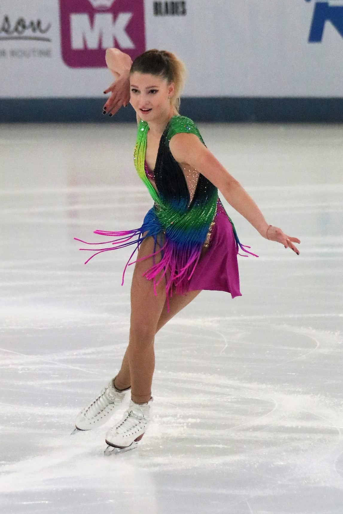 Мария Сотскова на чемпионате России по фигурному катанию на коньках 2019